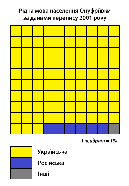 Інфографіка розподілу населення смт Онуфріївка за рідною мовою згідно з даними перепису 2001 року. Джерело: Розподіл населення Кіровоградської області за рідною мовою (у % до загальної чисельності населення) за переписом 2001 року